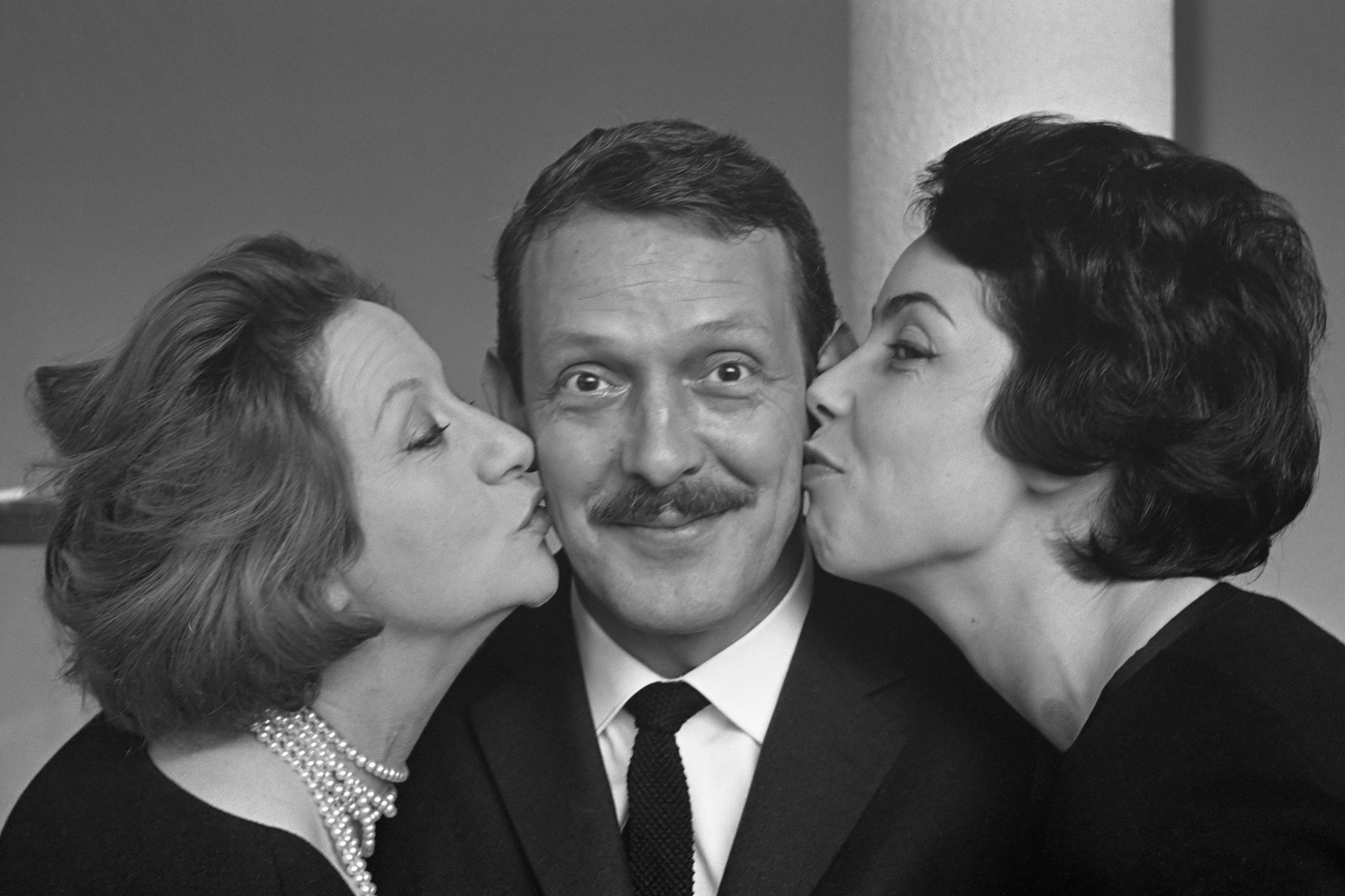 Opname van afscheidsconcert voor Jos Cleber. Jos Cleber wordt door Conny Stuart en Corry Brokken gekust 21 januari 1962